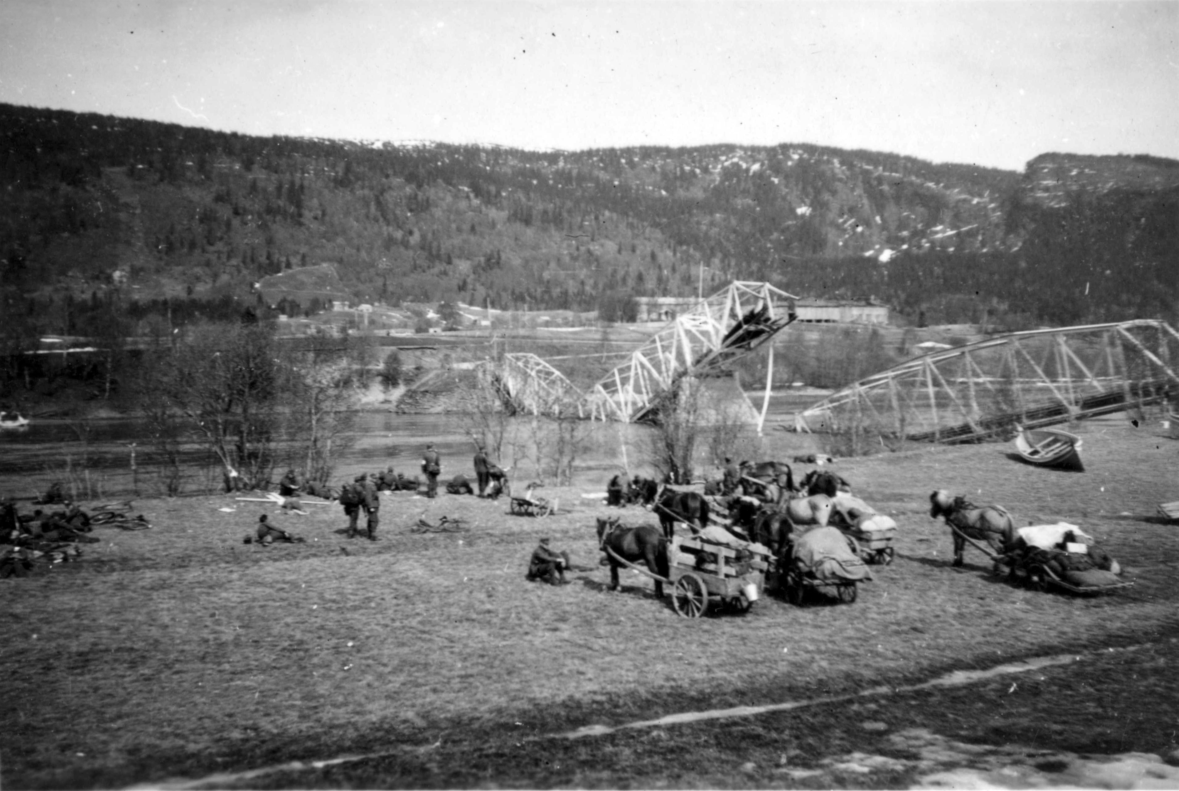 Østerriske bergjegere fra 137. Bergjegerregiment ved den sprengte brua i Selfors Tittel / Title: Brua over Rana-elva (Selfors) Dato / Date: ca. 18 eller 19.mai 1940 Fotograf / Photographer: Karl Marth Sted / Place: Selfors, Mo i Rana, Nordland, Norge Eier / Owner Institution: Arkiv i Nordland Lenke / Link: Arkiv i Nordland Arkivreferanse /Archive reference: AIN.NA143.0020 Fra Dag Skogheims Privatarkiv Nordland County Archives Native nameArkiv i NordlandLocationBodøCoordinates67° 17′ 24.37″ N, 14° 33′ 34.77″ E Established1995Web page control : Q11958968 institution QS:P195,Q11958968